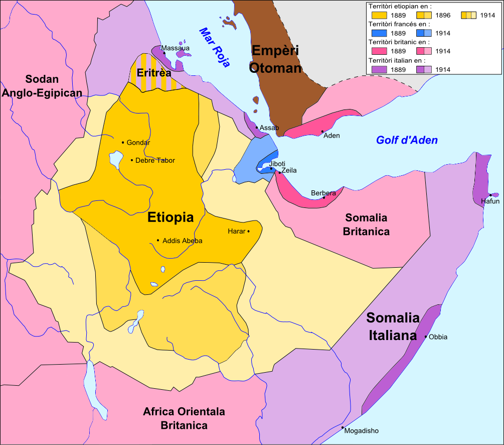 Expansion d'Etiopia e partiment de l'Africa Orientala entre 1889 e 1914.